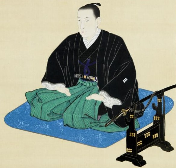 真田幸教の肖像。